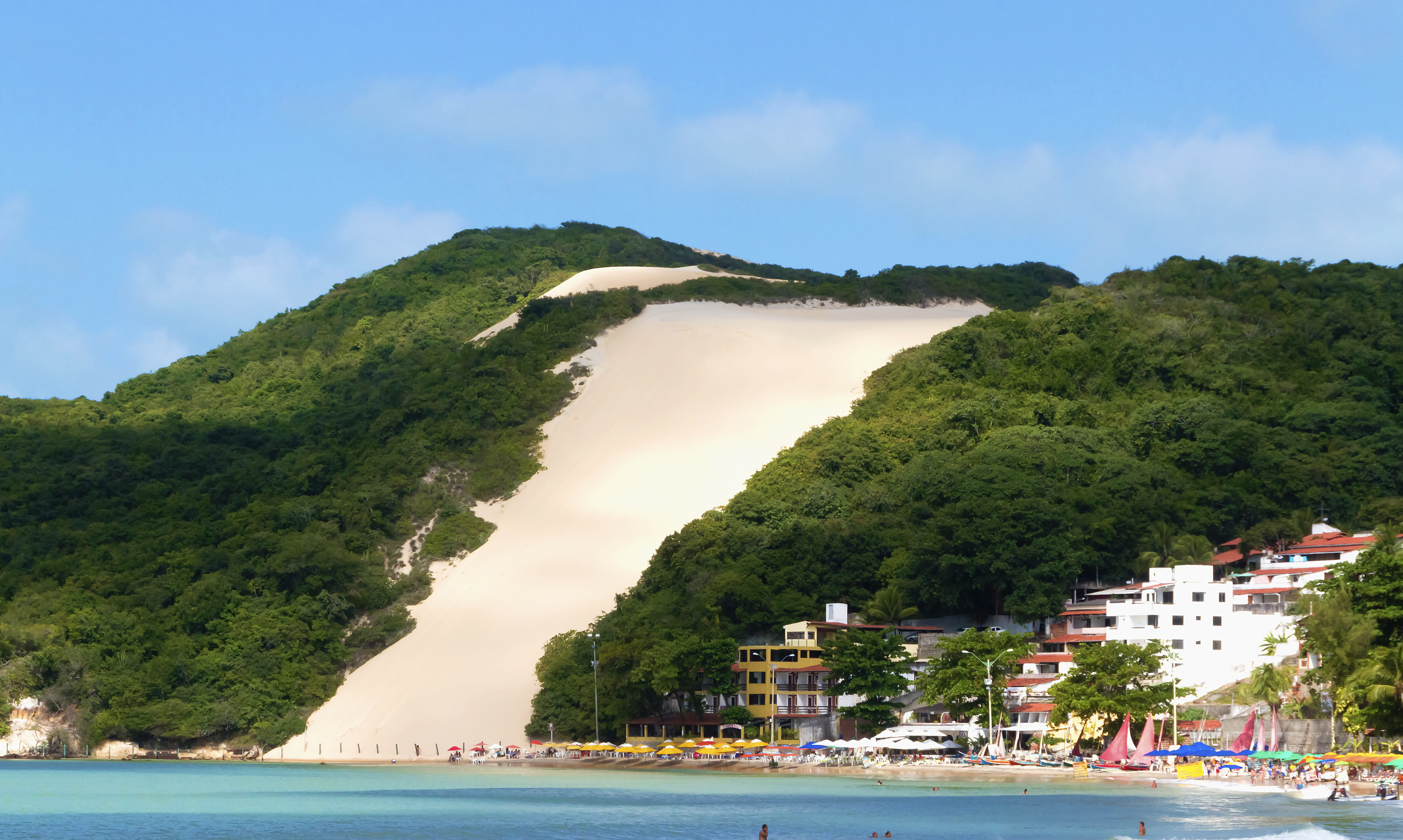 Morro do Careca, em Natal, Brasil.